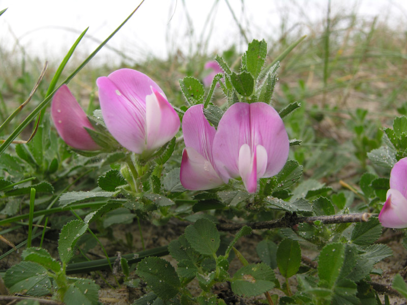 kruipend stalkruid (Ononis repens)